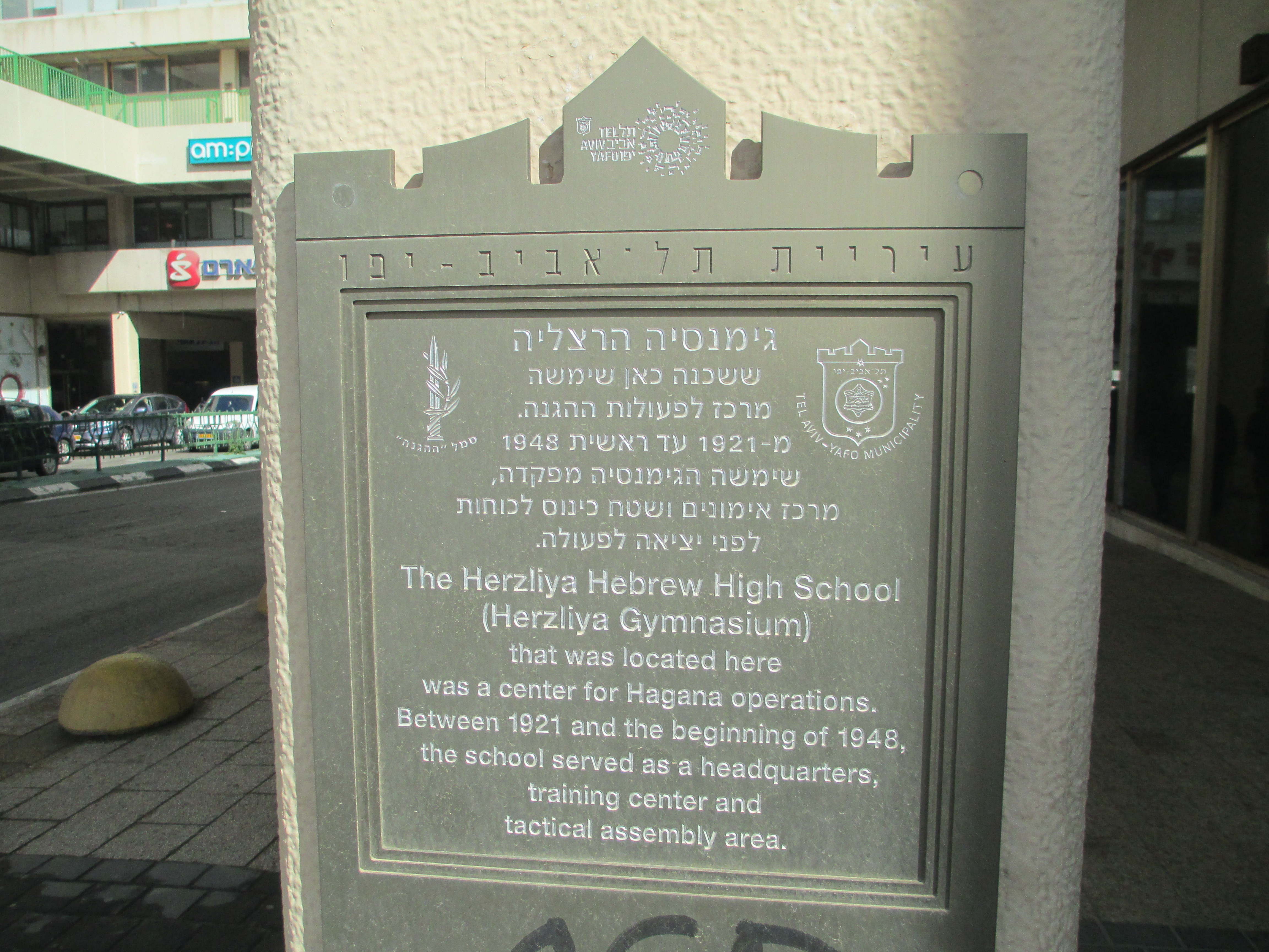 לוחית זיכרון לגימנסיה הרצליה במקומה הקודם, רחוב אחד העם פינת הרצל